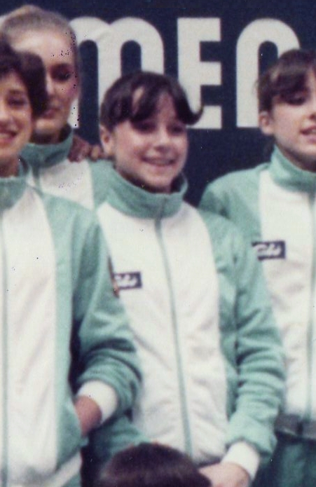 Pilar Domenech con la selección nacional en la Final de la Copa del Mundo de Belgrado en 1983.